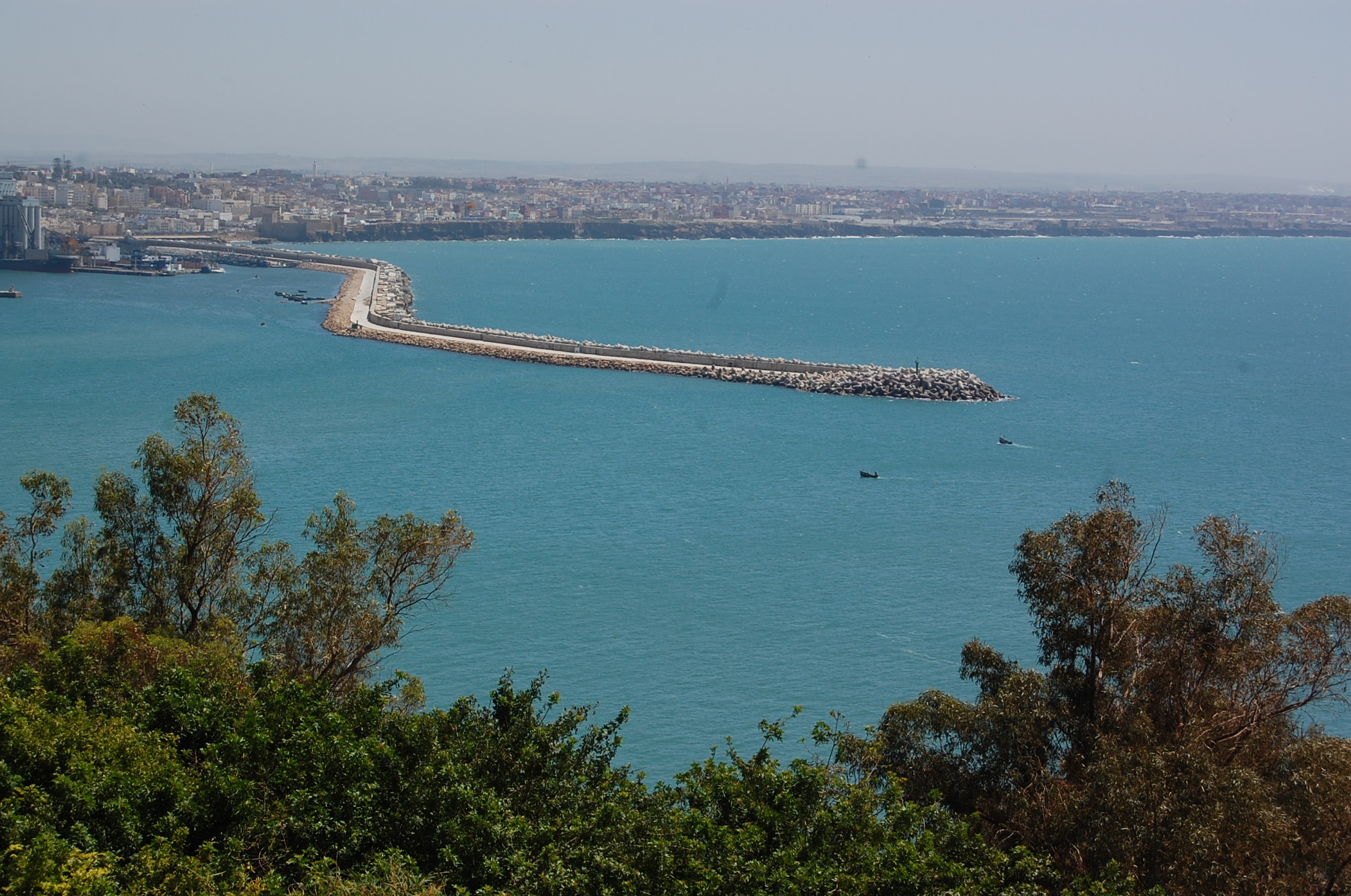 Walon: djetêye do pôrt d' Asfi